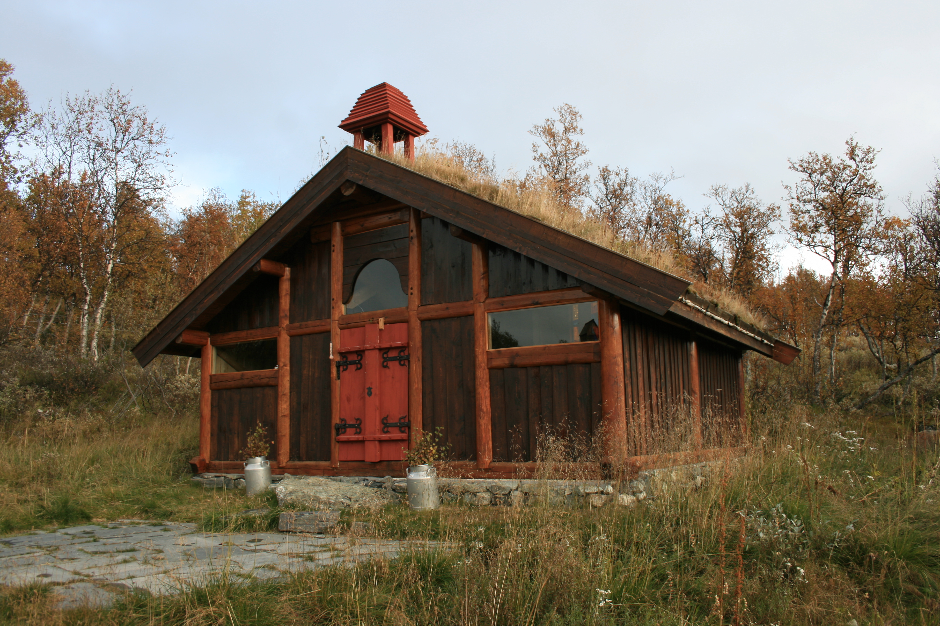 Harahorn kapell ligger nord i Hemsedal, i Buskerud fylke, Norge.